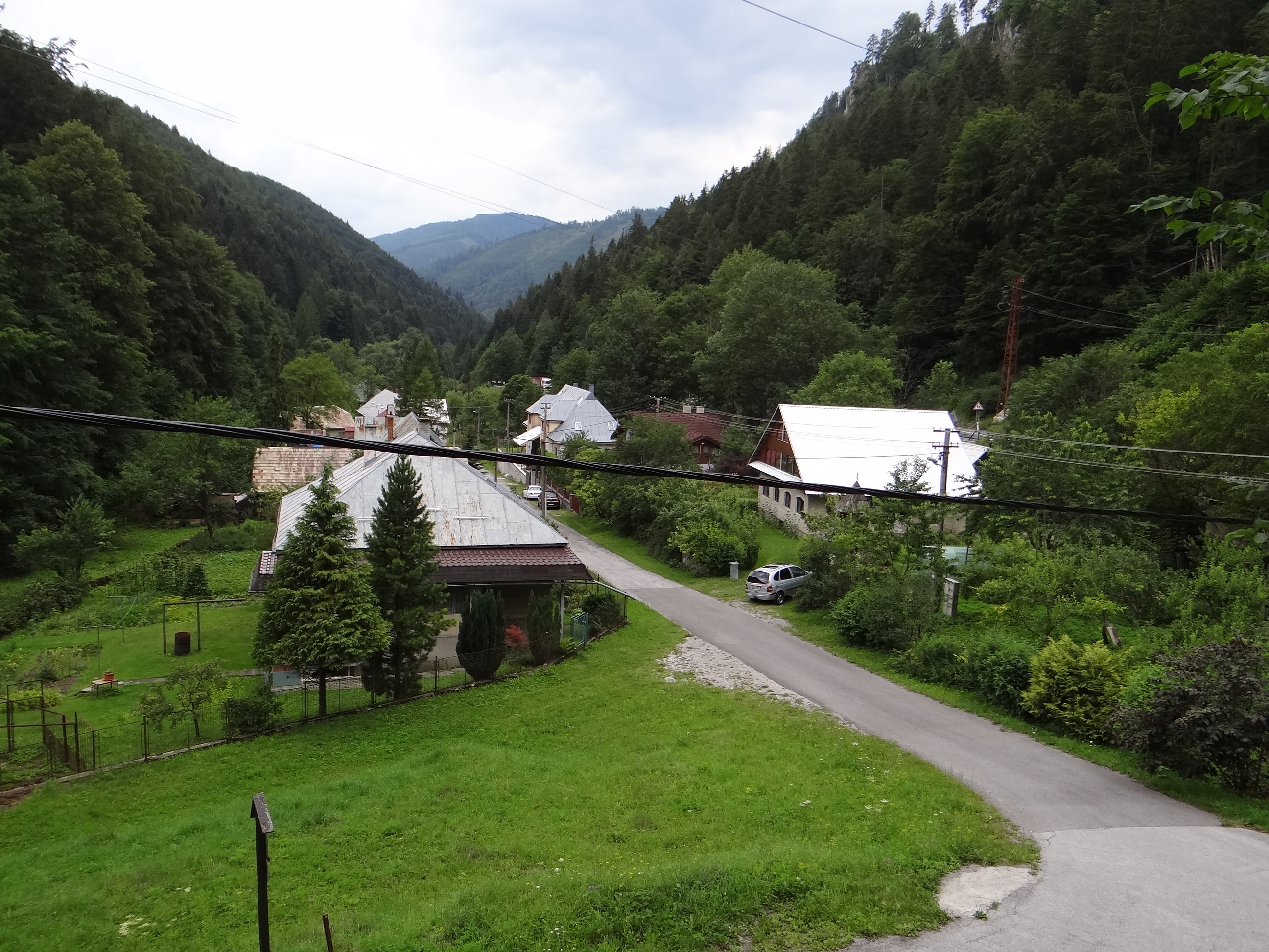 Dolný Jelenec